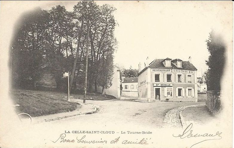 LA CELLE- SAINT- CLOUD -1903- RESTAURANT LE TOURNE- BRIDE - MAISON BRUELLE